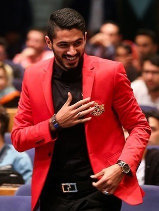 تصویری از شایان مصلح